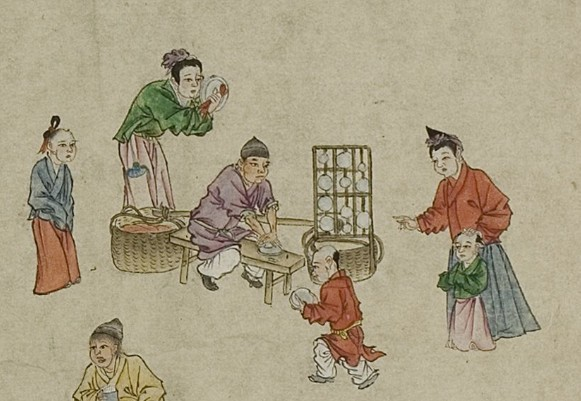 中文（香港）: 太平風會圖